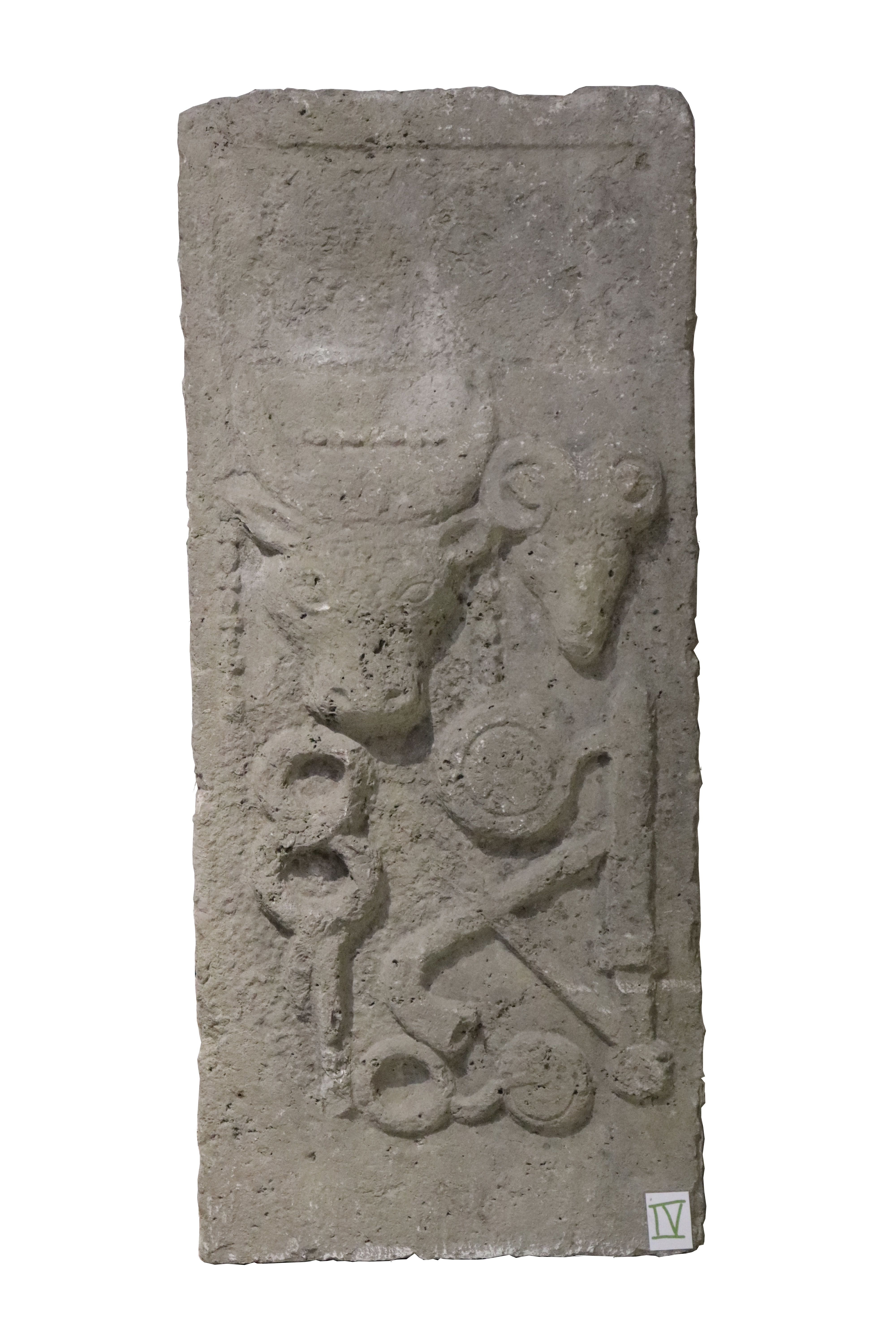 Autel taurobolique trouvé à la ferme de Salières, près de Die. Inscription effacée en partie supérieure, décor : tête de taureau avec bandelettes, tête de bélier de profil, harpè, corne et tibia croisées, tympanon, caducée, cymbales. Hauteur 1,34 m, largeur 0,42 m, profondeur 0,17 m